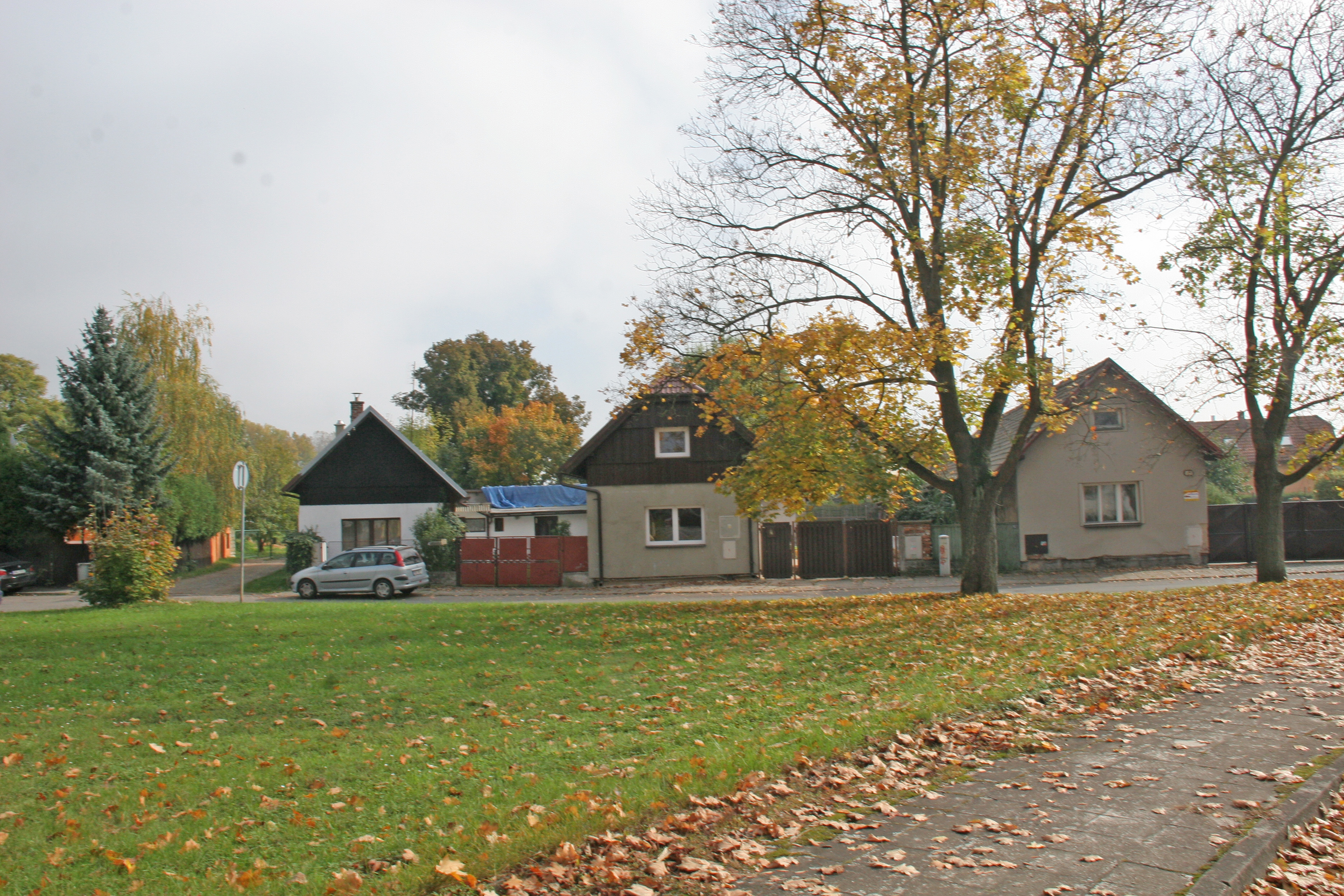 Chudonice parčík